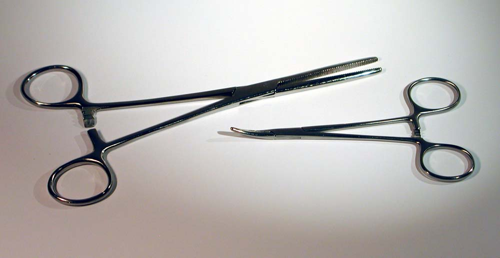 Tupferzangen groß